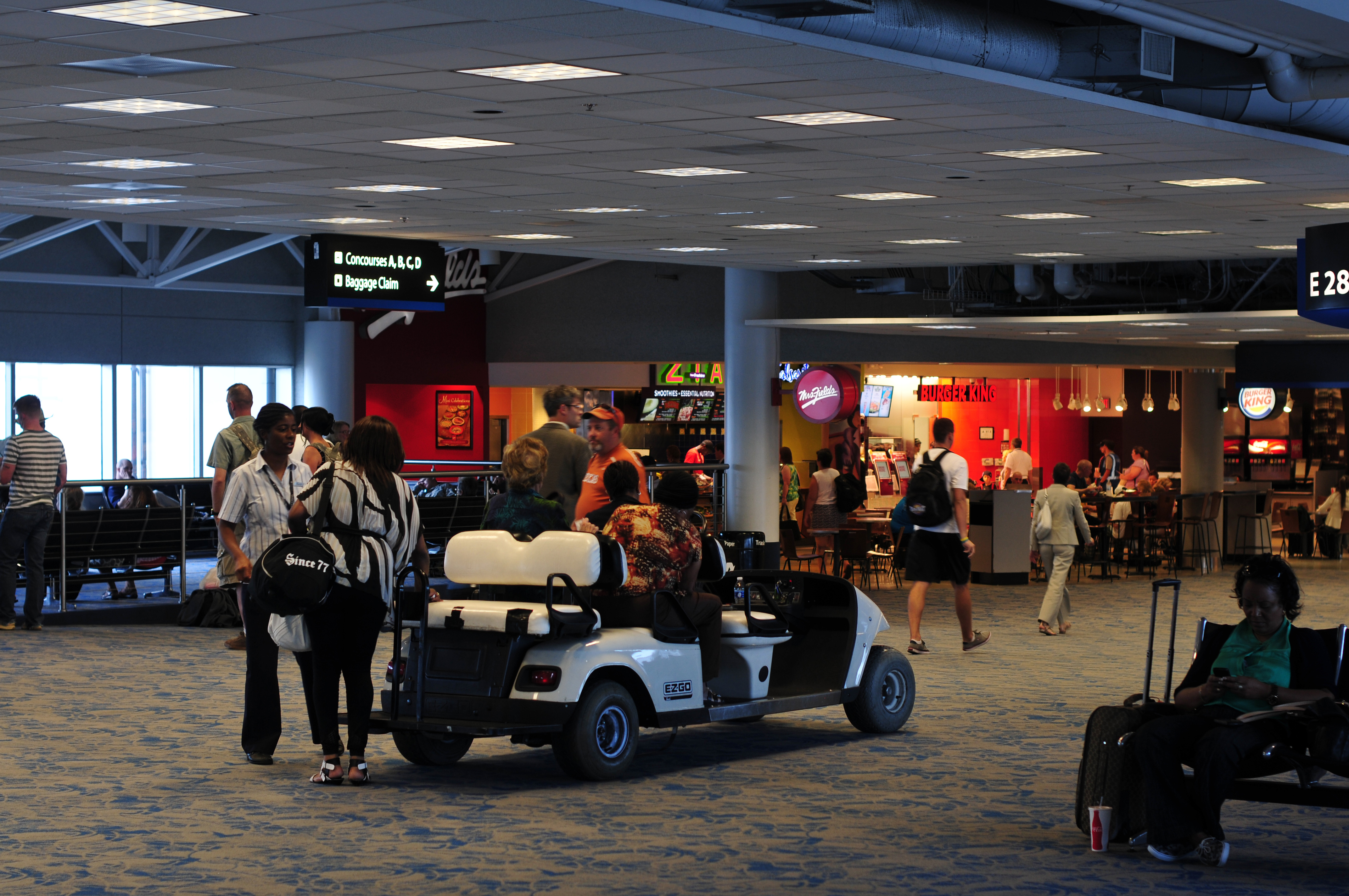 Impressionen Wikimania Washington D.C. 2012 The making of this work was supported by Wikimedia Austria. For other files made with the support of Wikimedia Austria, please see the category Supported by Wikimedia Österreich.